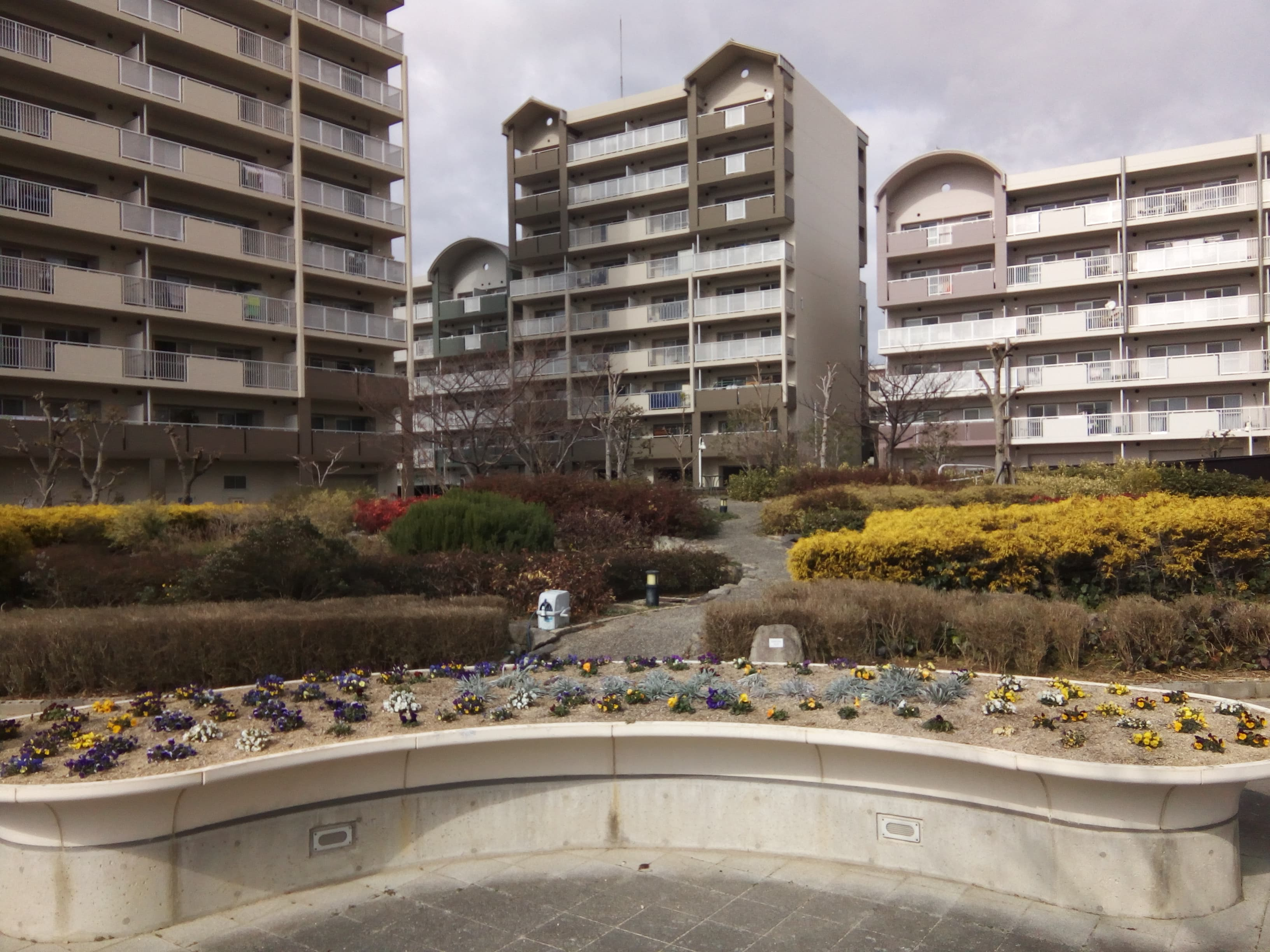 注文の多い楽農店（だんだん畑）の様子（市営団地側）